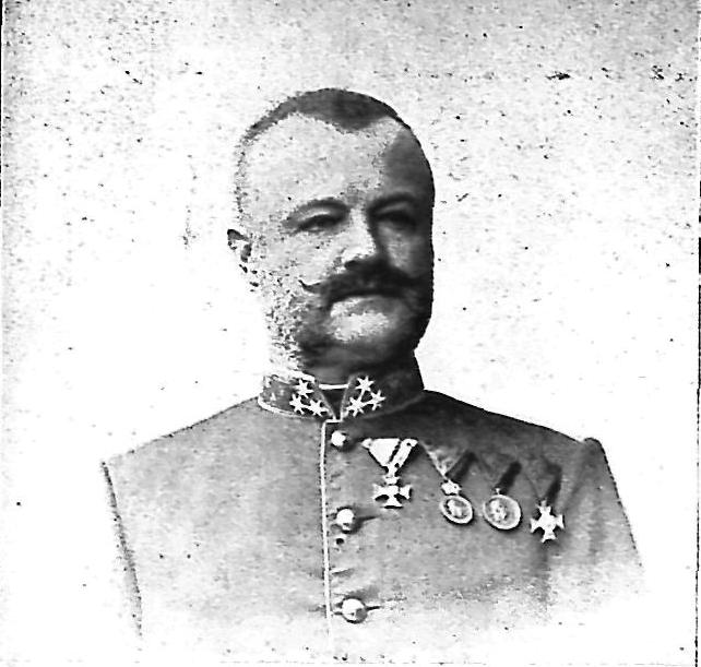 Đuro Čanić, hrvatski podmaršal (1849-1911)